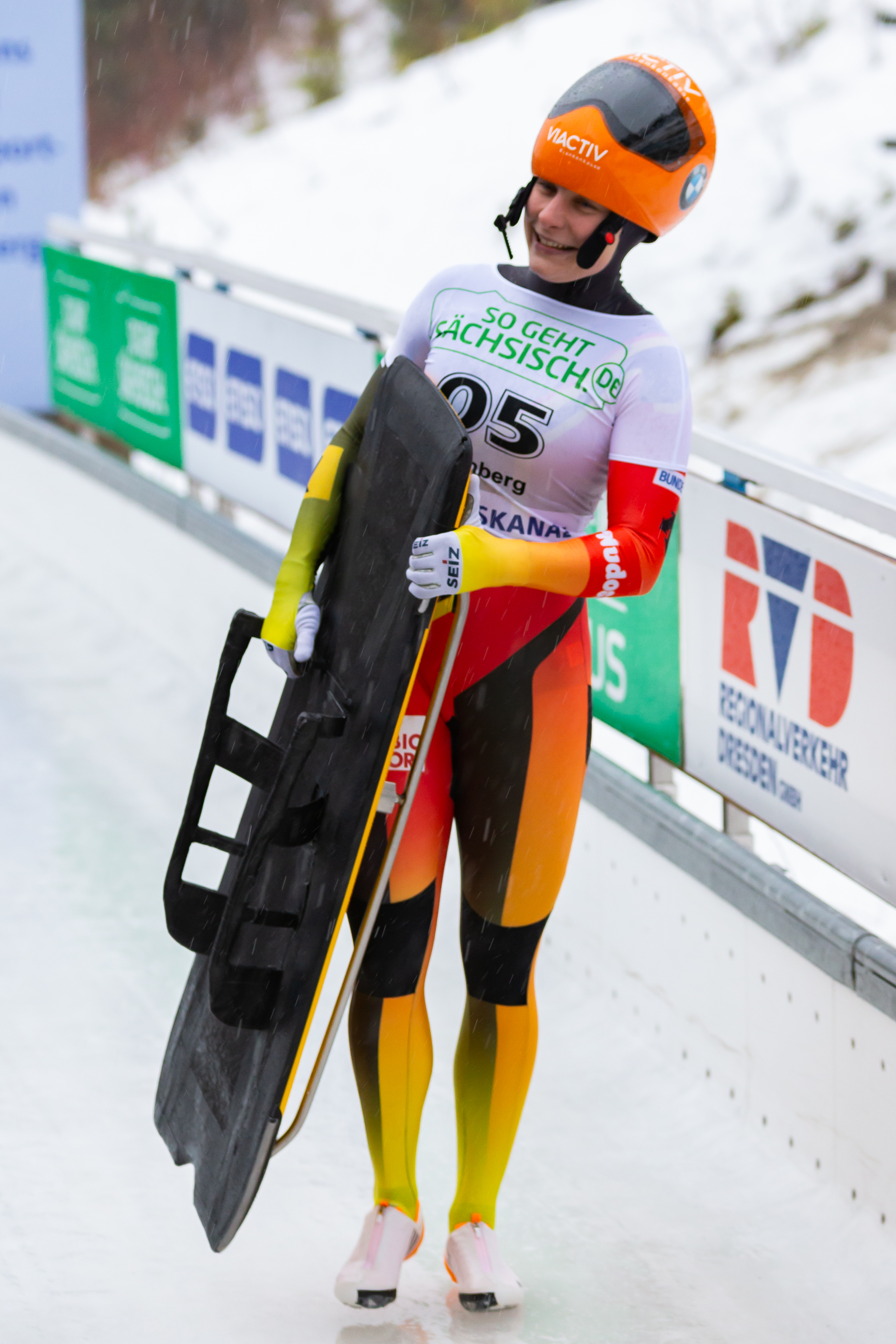 Deutsche Meisterschaften Skeleton; Tina Hermann (WSV Königssee) im Ziel; Sieger, Erstplatzierter, Goldmedaille, gold medal